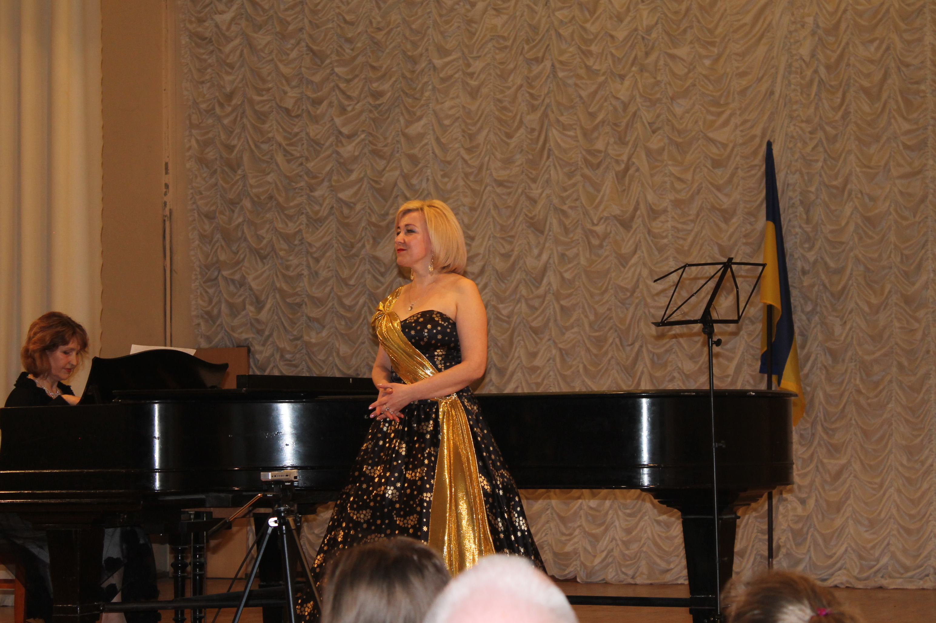 Ірина Козачук, заслужений працівник культури України Галина Швидків. Фотографії з концерту 26 березня 2017 року "Пісні Ф. Шопена в сучасних українських перекладах" у Києві